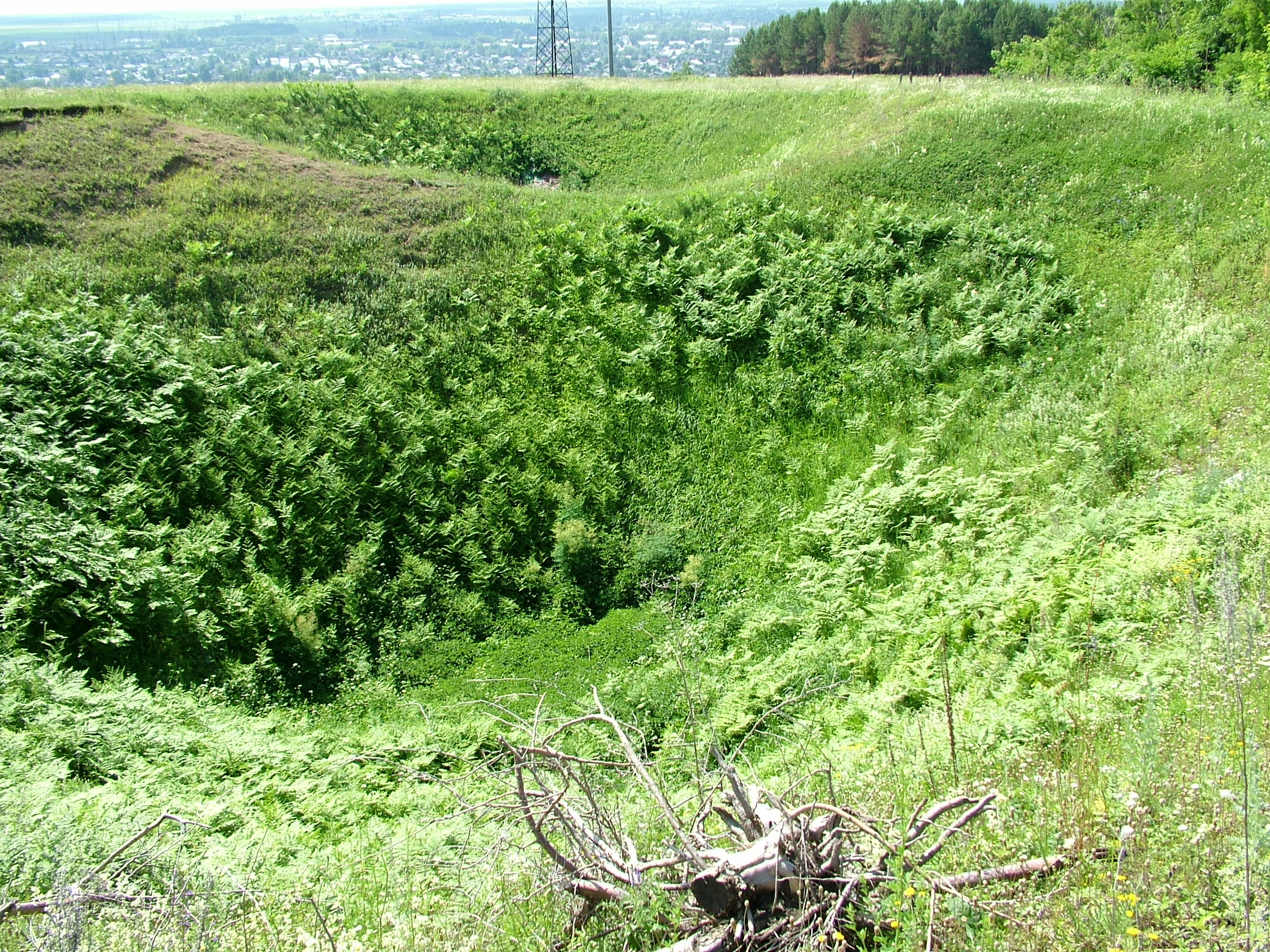 Ледяная гора Кунгура. Историко-природный комплекс "Ледяная гора и Кунгурская ледяная пещера", Пермский край This image is related to the protected area of Russia number 5910237